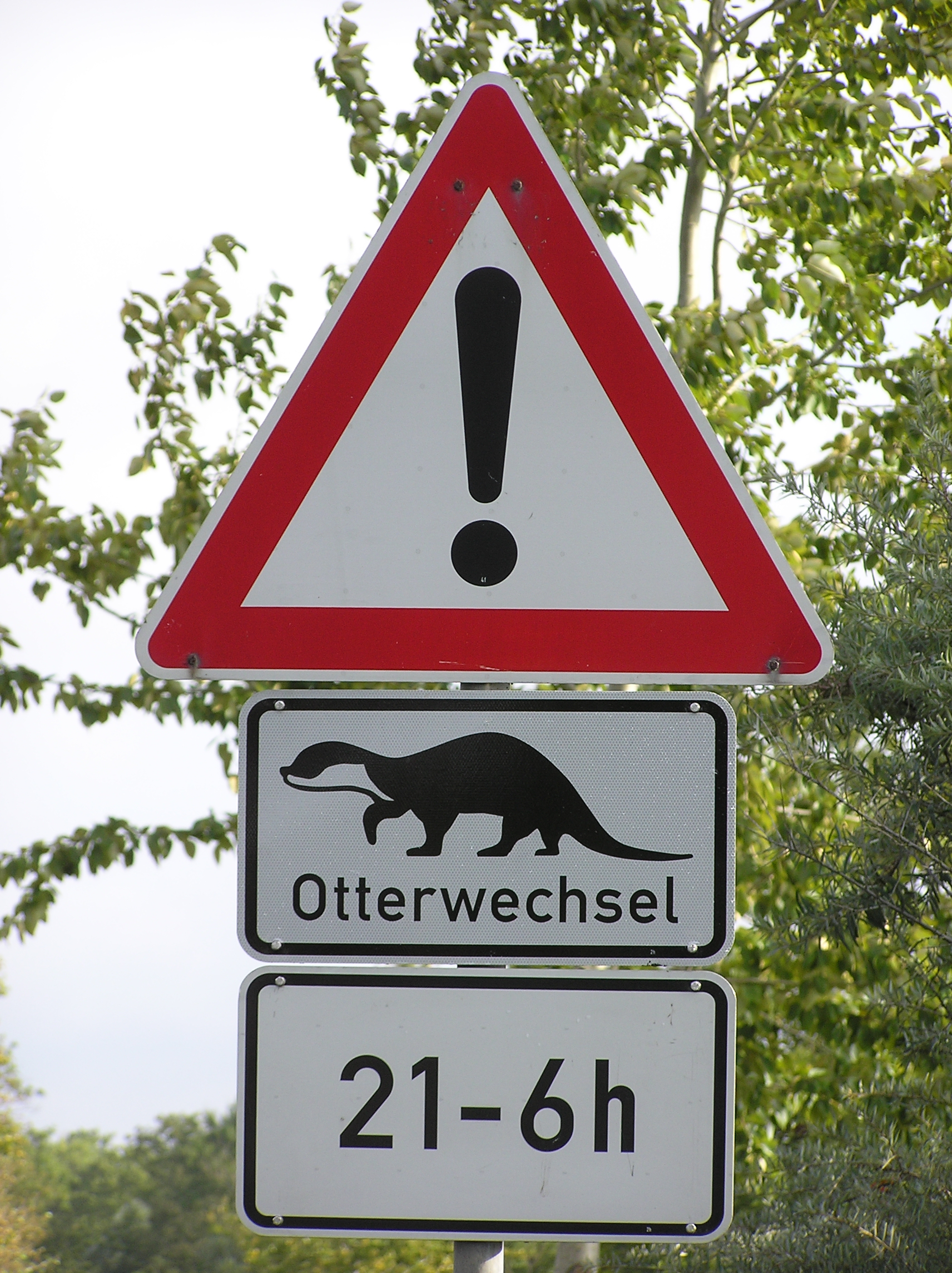 ... es geht auch so.